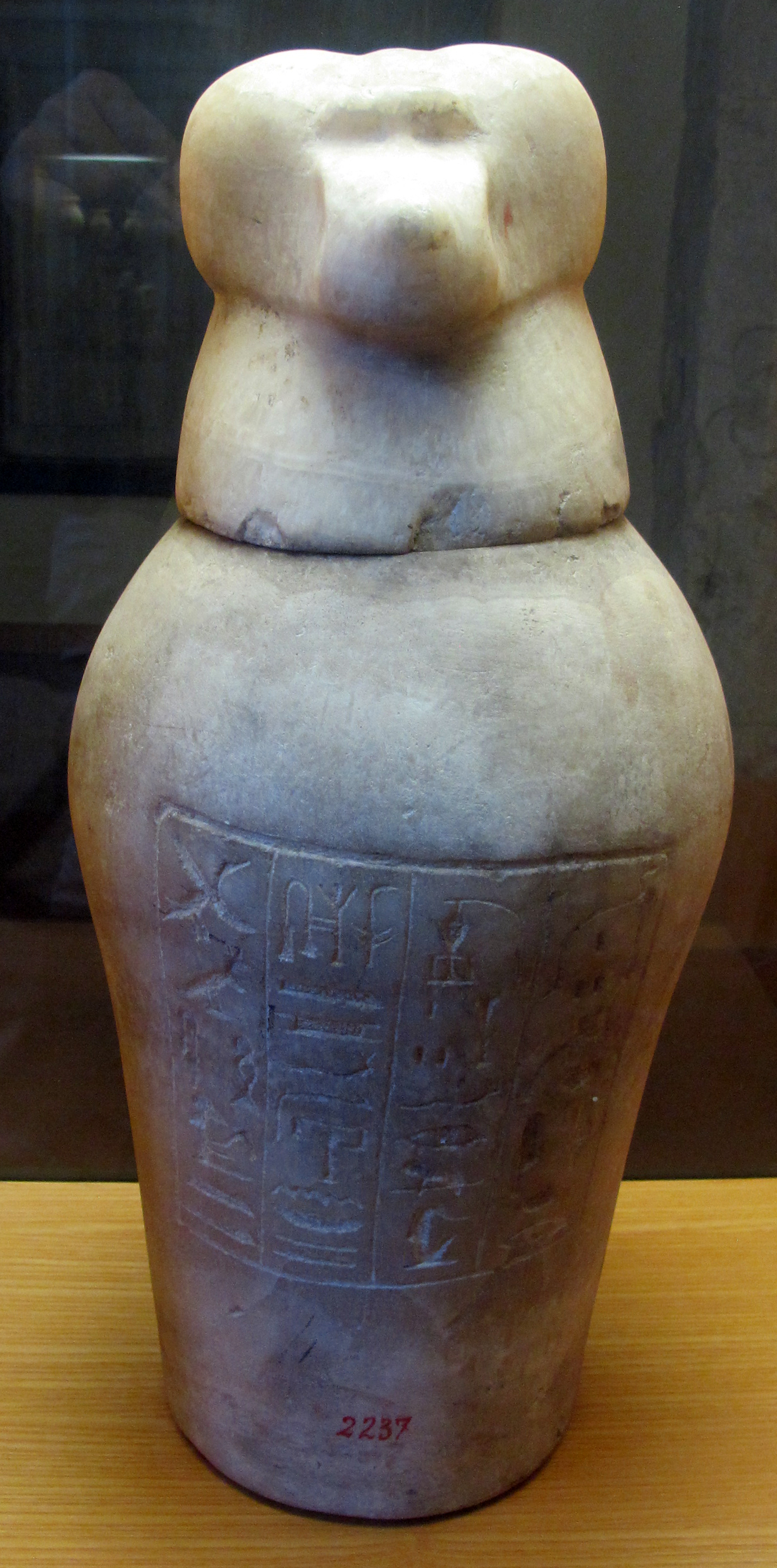 Ancient Egyptian art in the Museo archeologico nazionale (Florence)